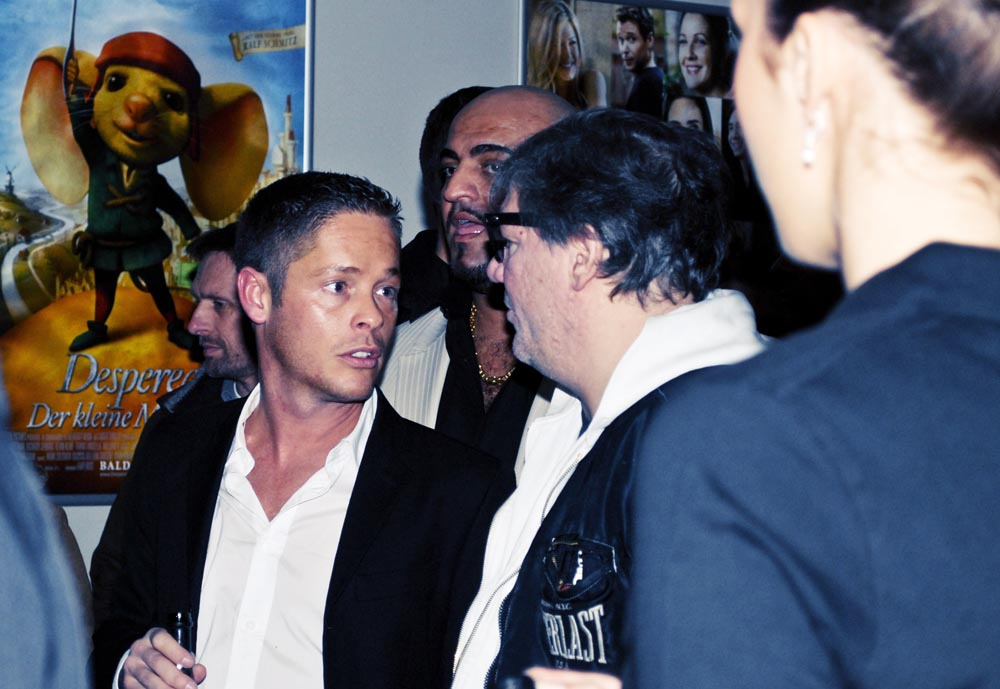 Claude-Oliver Rudolph Benjamin Eicher Premiere "Kopf oder Zahl"